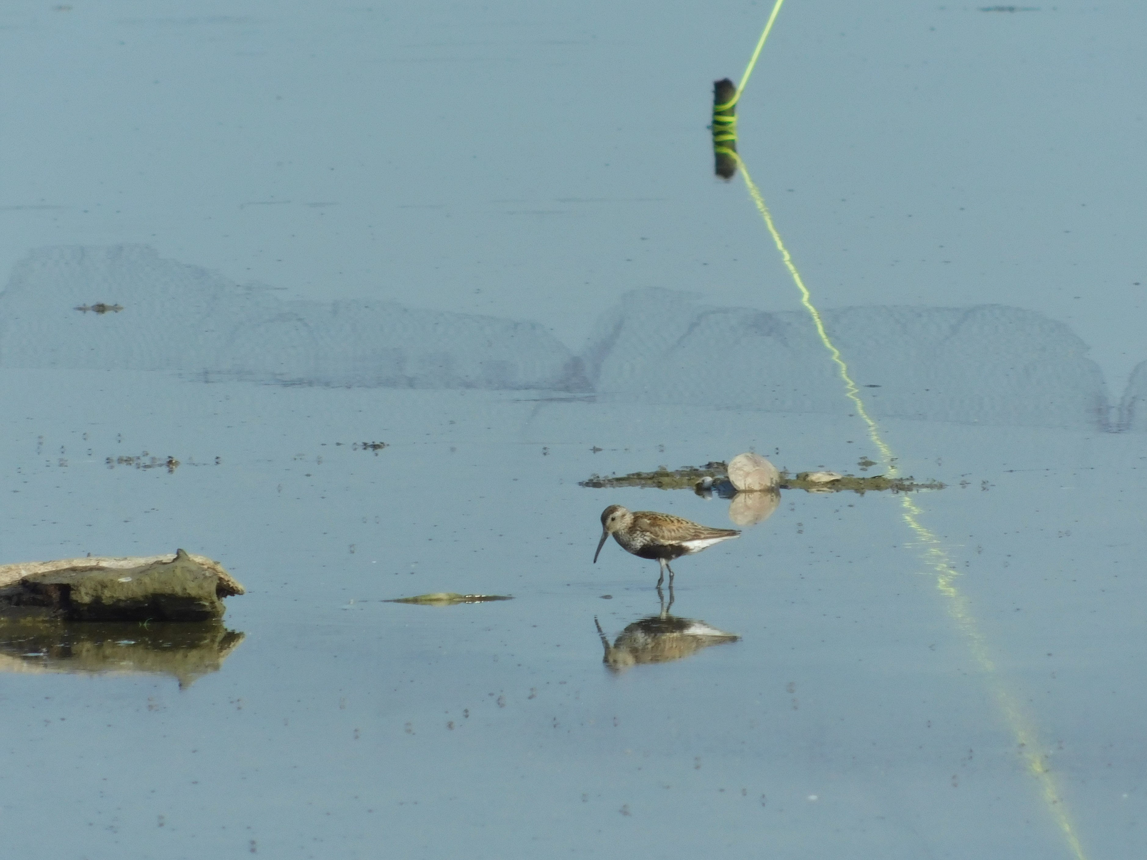 Srpski (latinica): Crnotrba sprutka se u Srbiji sreće samo tokom seobe. Ova jedinka se hranila blizu ornitoloških mreža na kampu Društva za zaštitu i proučavanje ptica Srbije u SRP ,,Labudovo okno".